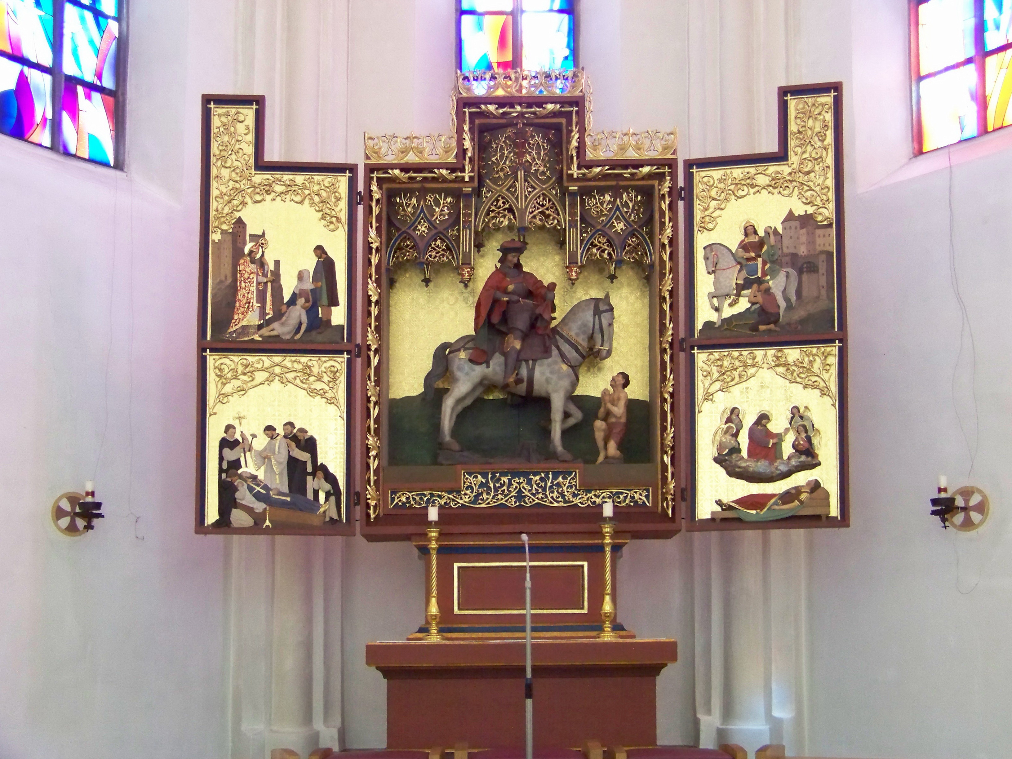 Geisenhausen, Martin-Zeiler-Straße 2. Katholische Pfarrkirche St. Martin. Flügelaltar.